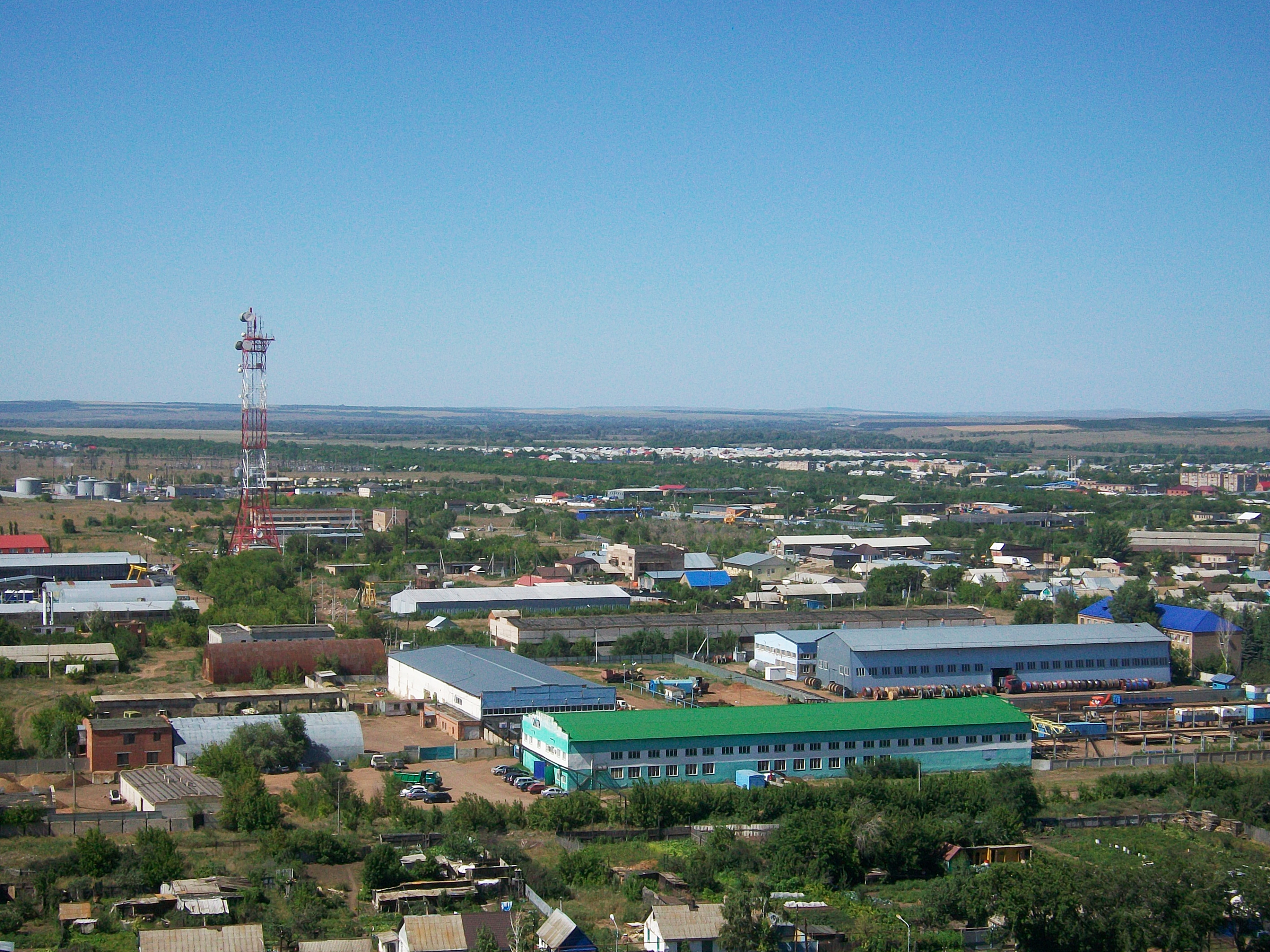 Западный микрорайон Сорочинска.